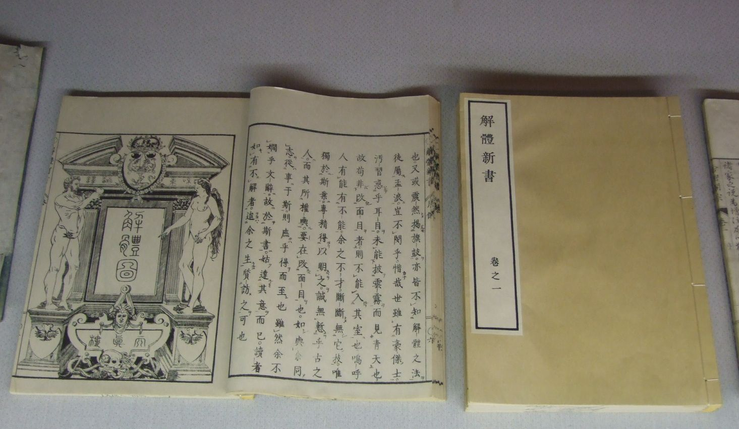 Kaitai_shinsyo01